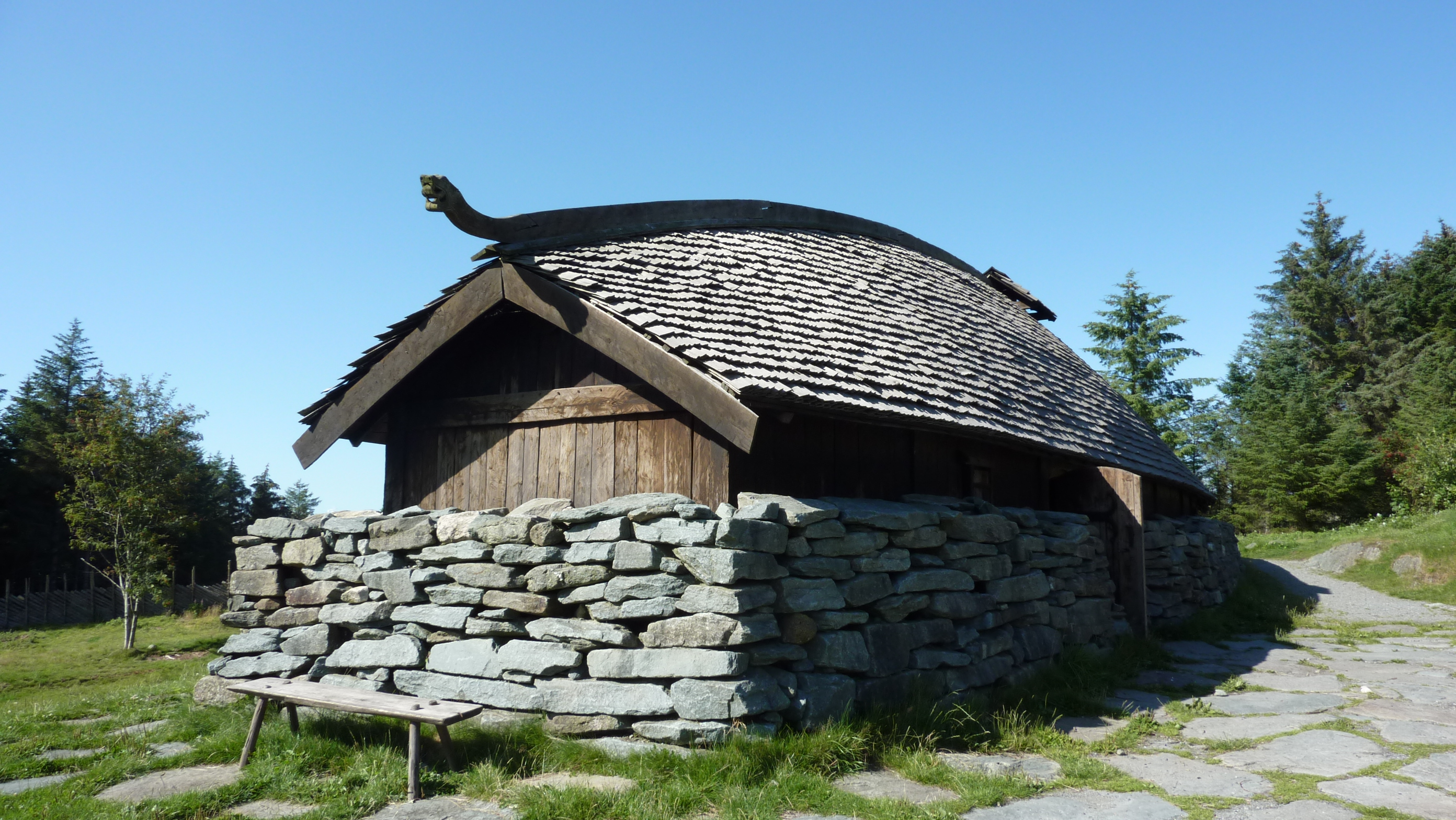 Rekonstruiertes Winkingerlanghaus auf der Insel Bukkoya bei Avalsnes